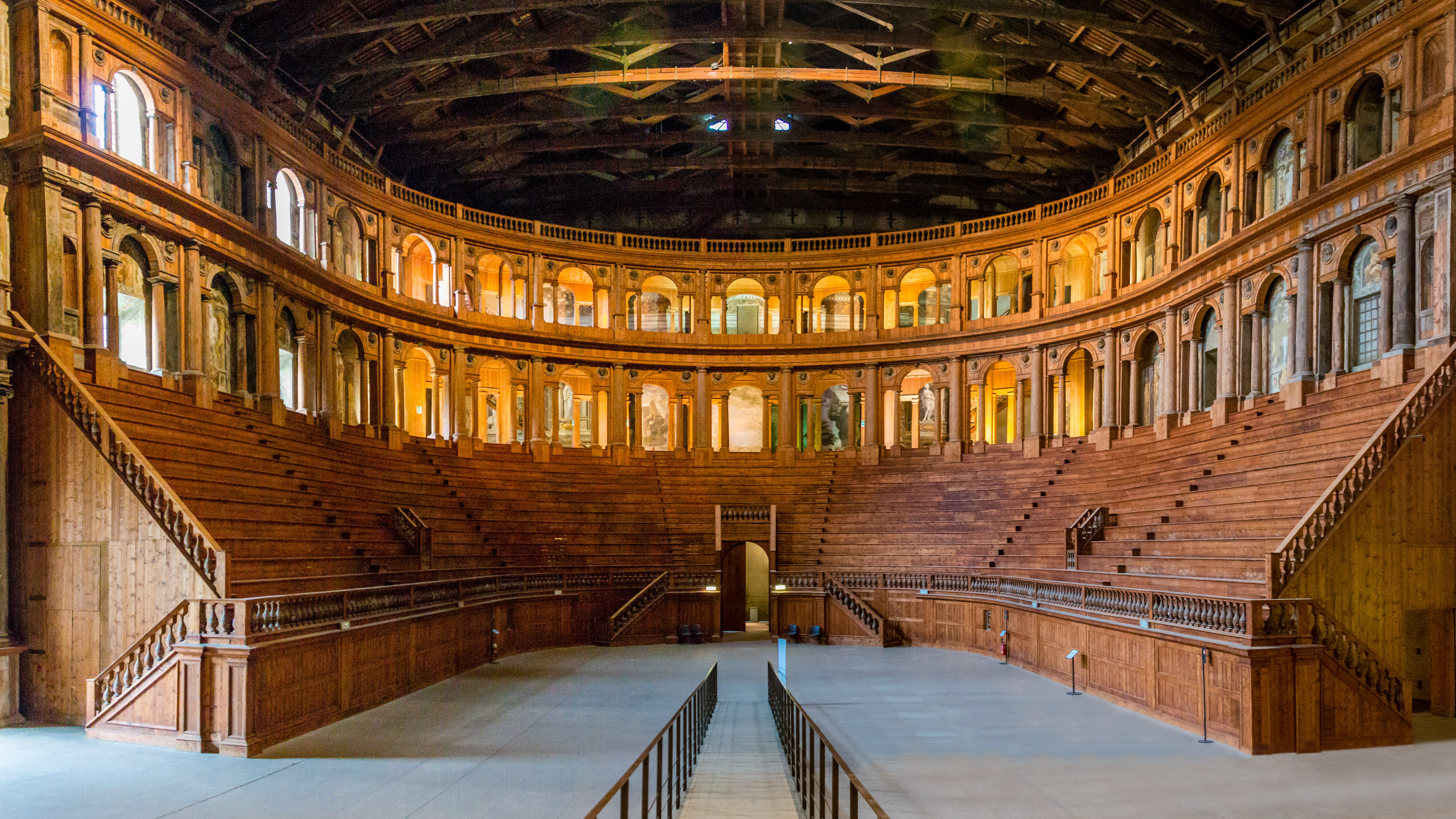 Teatro Farnese This is a photo of a monument which is part of cultural heritage of Italy.